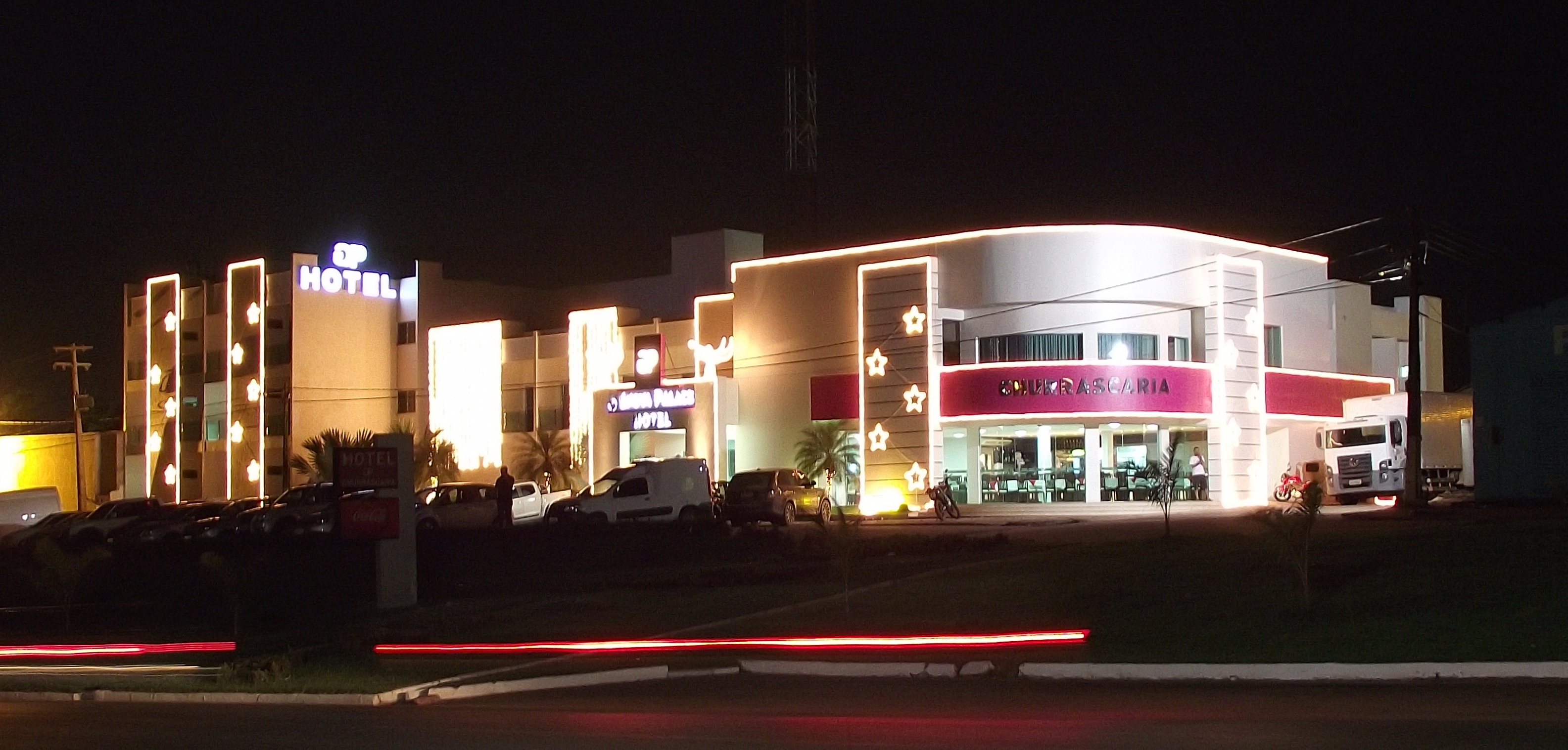 Um dos vários hotéis de Açailândia (MA).